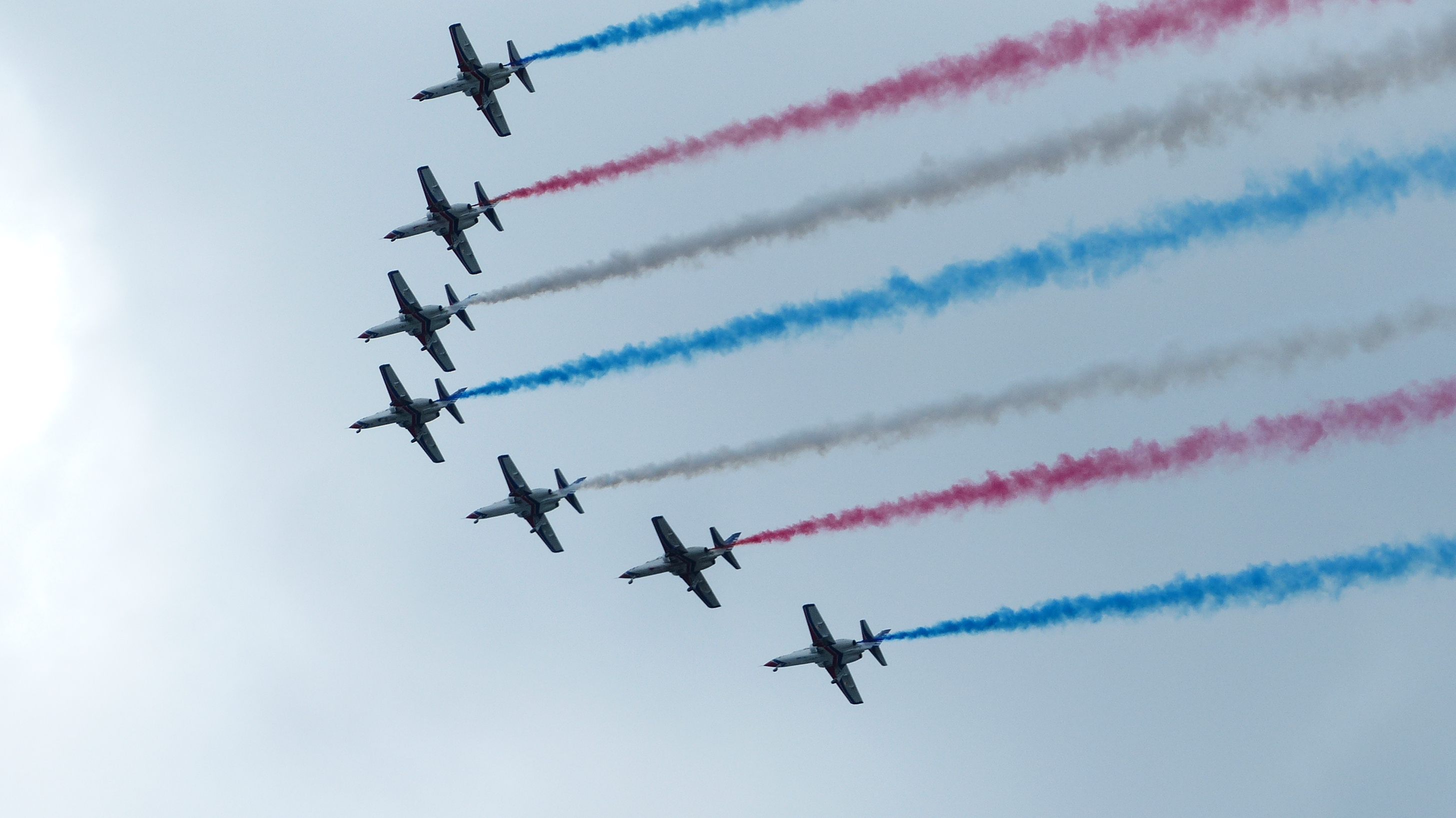 2013年空軍志航基地營區開放活動，雷虎特技飛行小組表演，七機V型編隊下降。